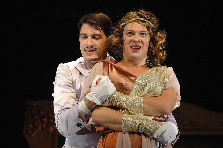 Српски (ћирилица): Сцене са премијере позоришне представе "Госпођа Министарка" у извођењу ансамбла позоришта Бошко Буха. На слици Горан Јевтић и Виктор Савић.